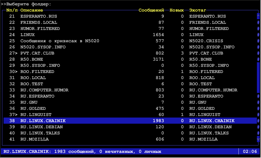 GoldED+, сборка на основе кода по состоянию на 2006-03-27. Список областей. Русификация «rus» (Перевод: Alexander S. Aganichev. Стиль перевода: весёлый)